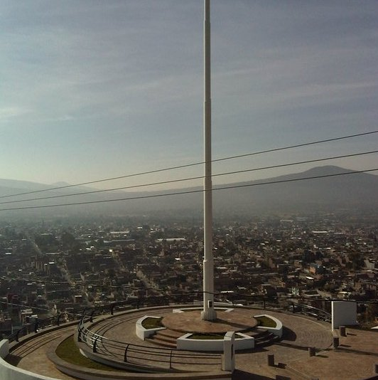 Monumento a la bandera en el mirador de Uriangato